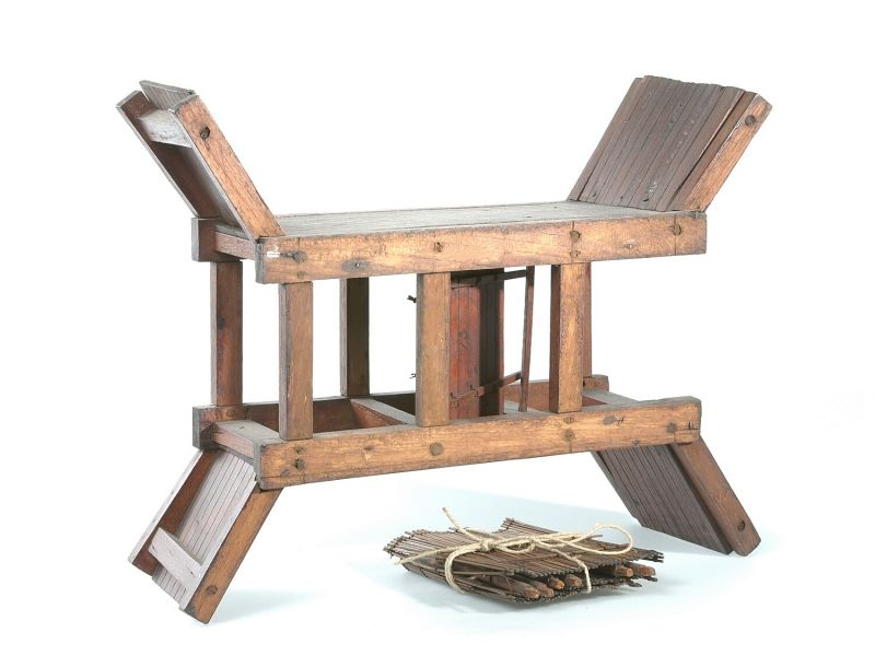 Model. Houten model van een val voor het vangen van tijgers.